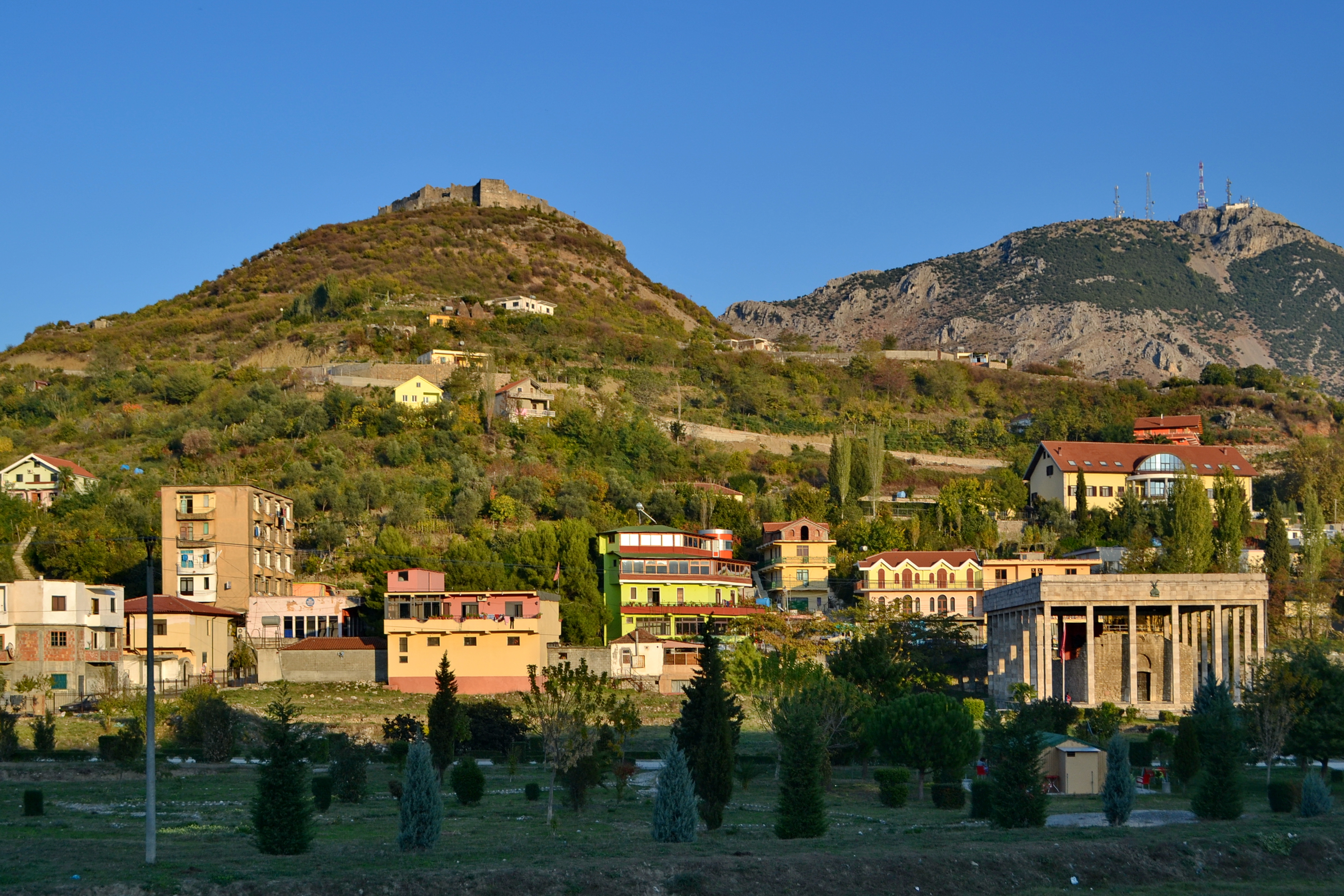 Varri i Skënderbeut & Kalaja - Lezhë.jpg